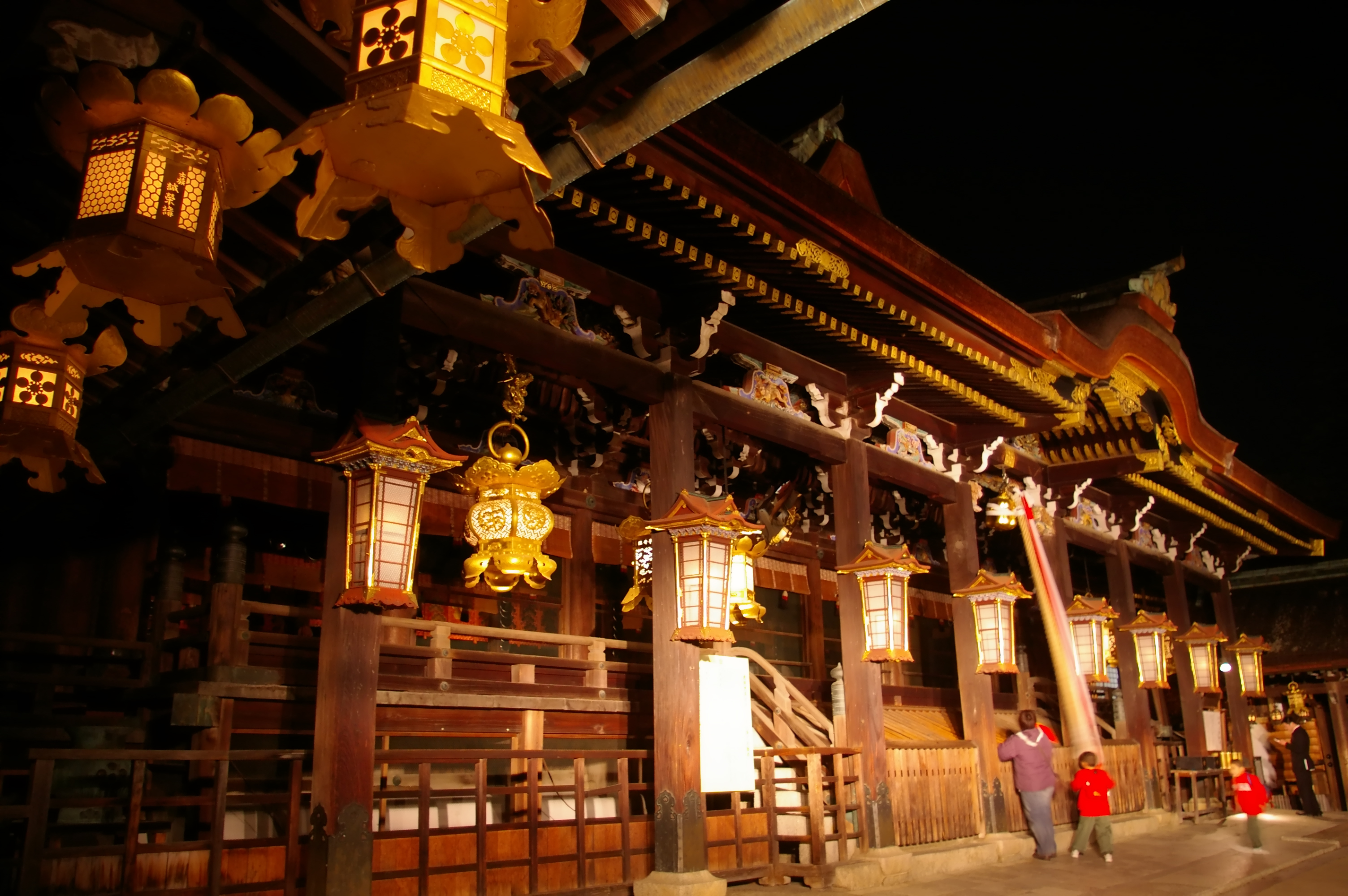 Honden,Kitano-tenmangu-shrine